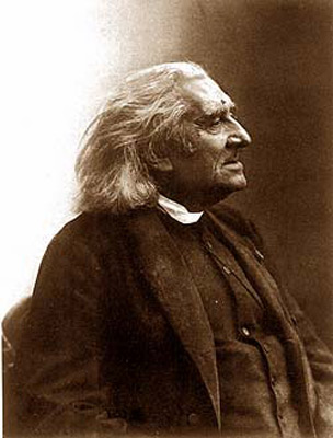 Photo of Franz Liszt (1811-1886)